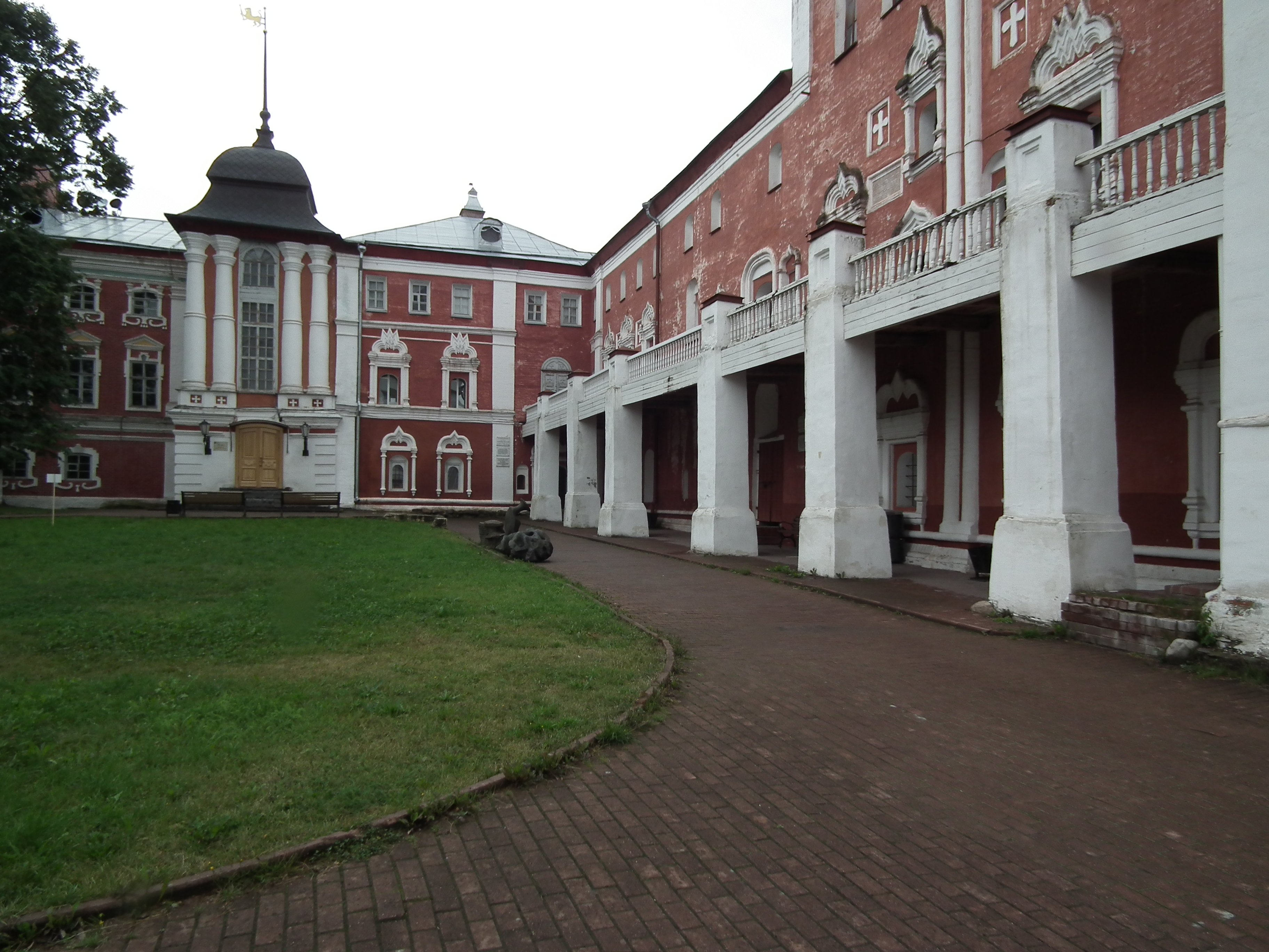 Вологодский Государственный историко-архитектурный и художественный музей заповедник — Гаврииловский корпус и Симоновский корпус (слева — направо)